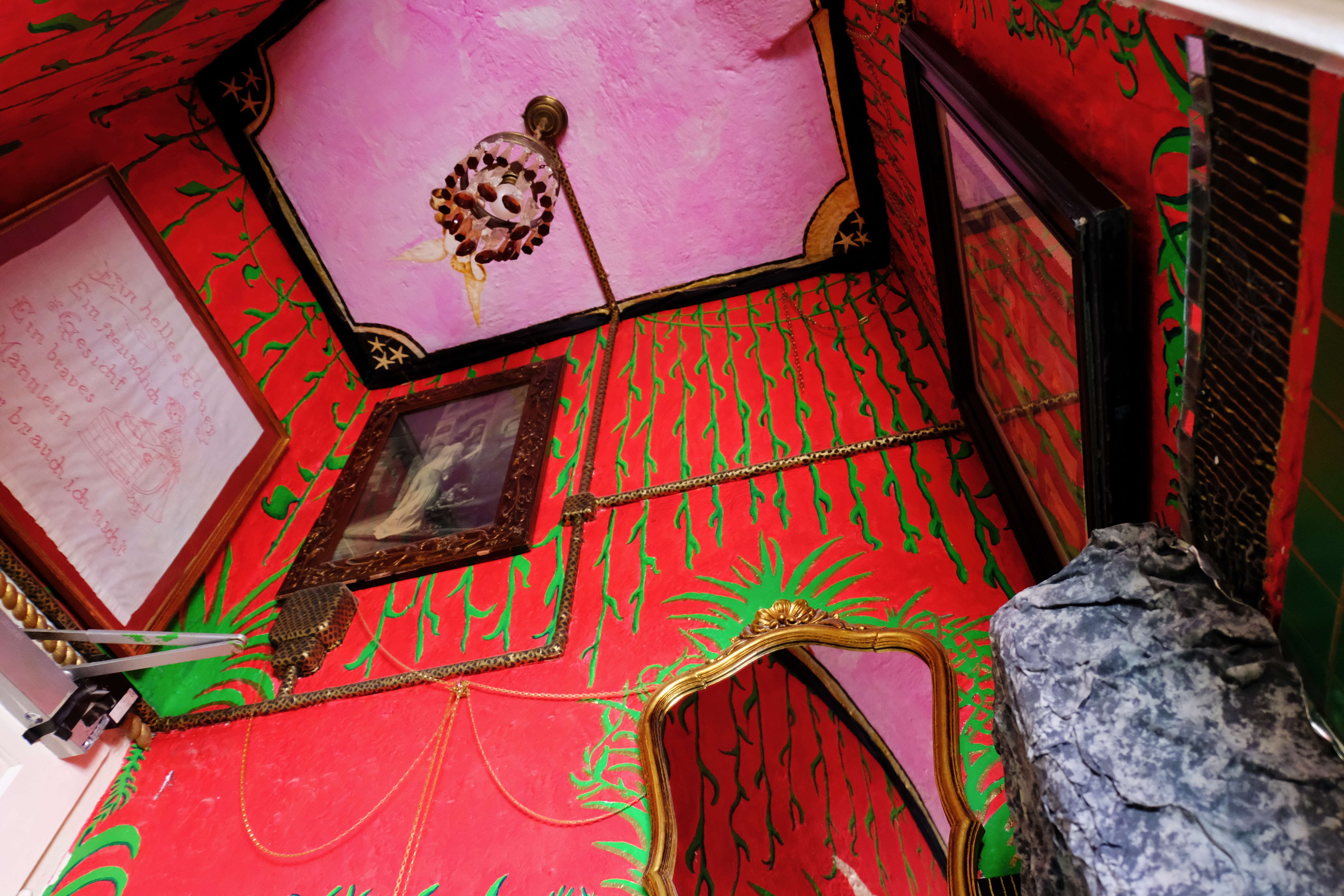 Von Anna McCarthy gestaltete Decke der Damentoilette des Valentin-Musäums (2020)